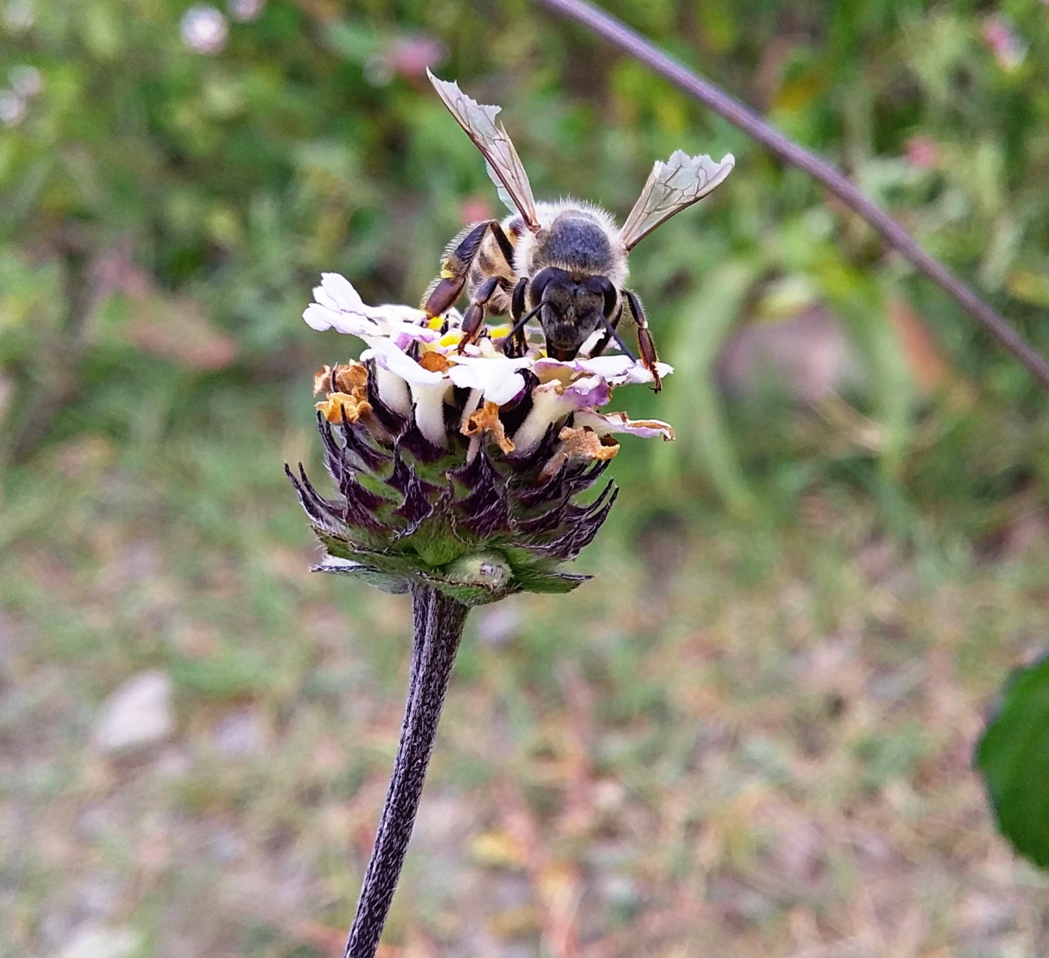 Foto de una Abeja